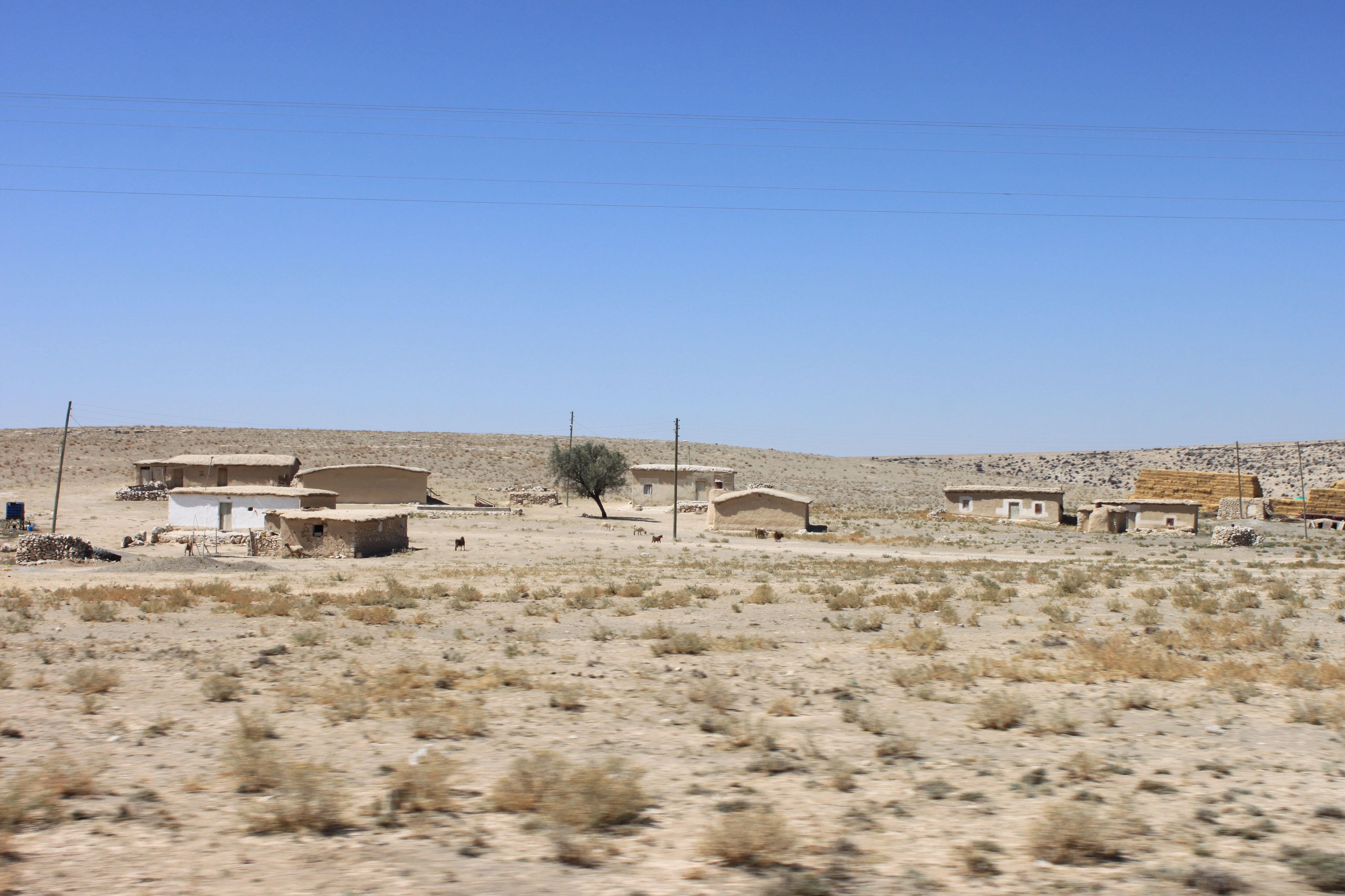 Das Dorf Çıralı; Kreis Karapınar, Provinz Konya liegt an der Riesendoline Çıralı Gölü.